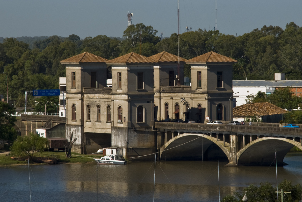 Portal jamais ultrapassado.